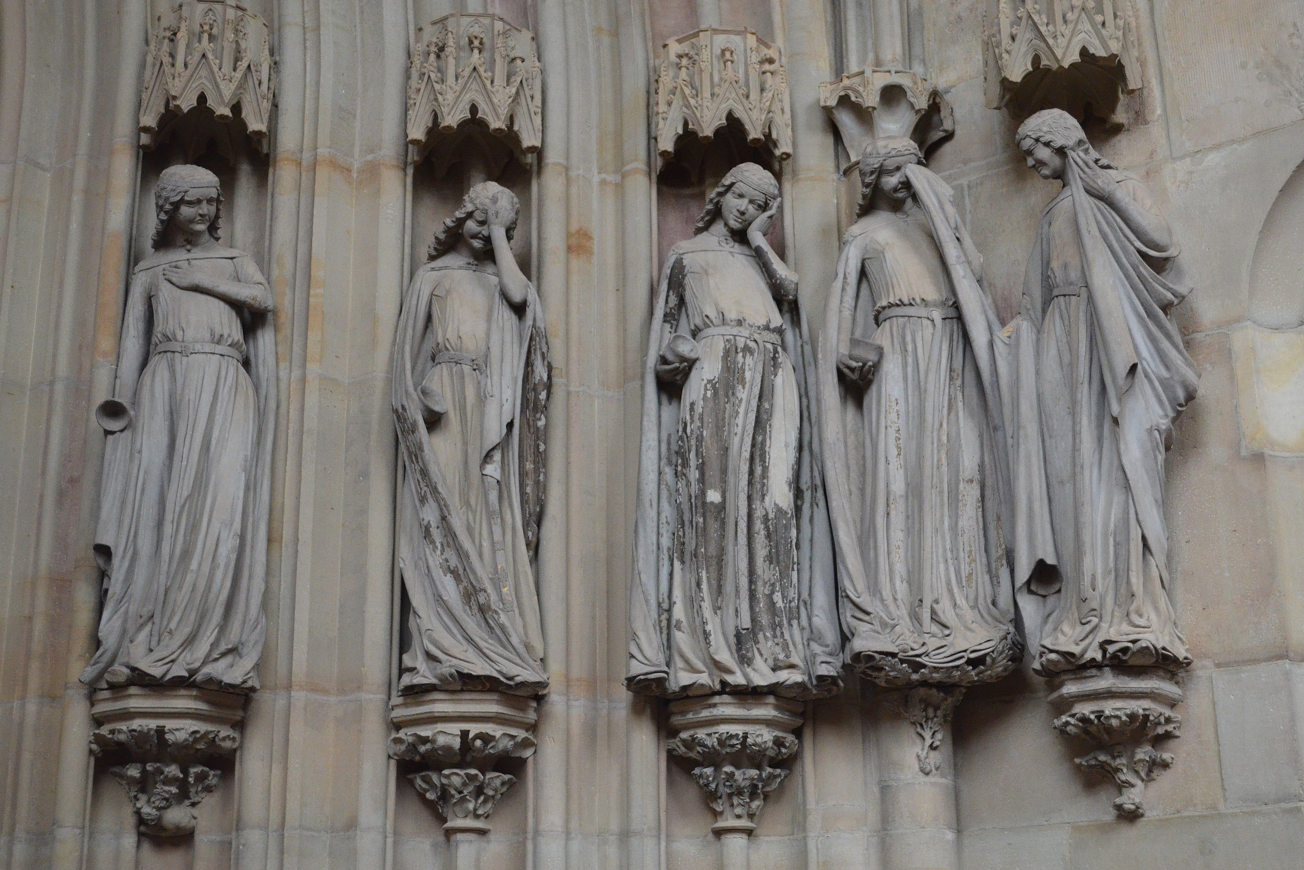 Maagdenburg, beelden dwaze maagden